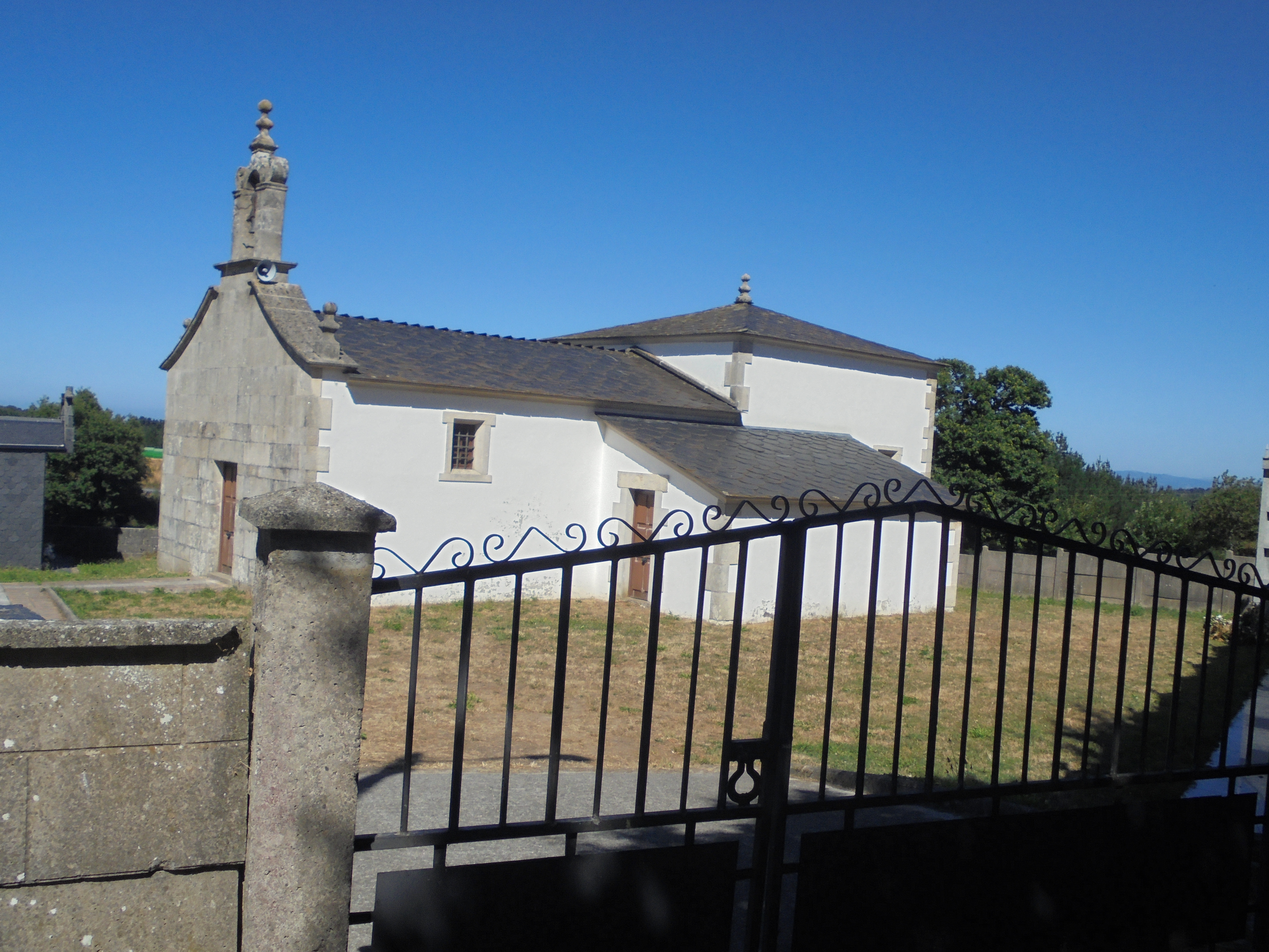 igrexa parroquial de Monte de Meda ( Lugo)